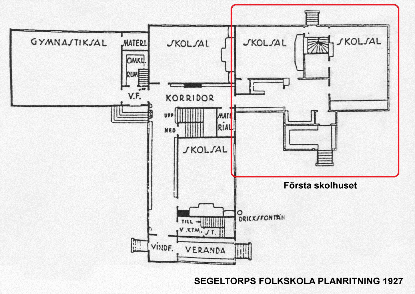 Segeltorps folkskola 1927, planritning